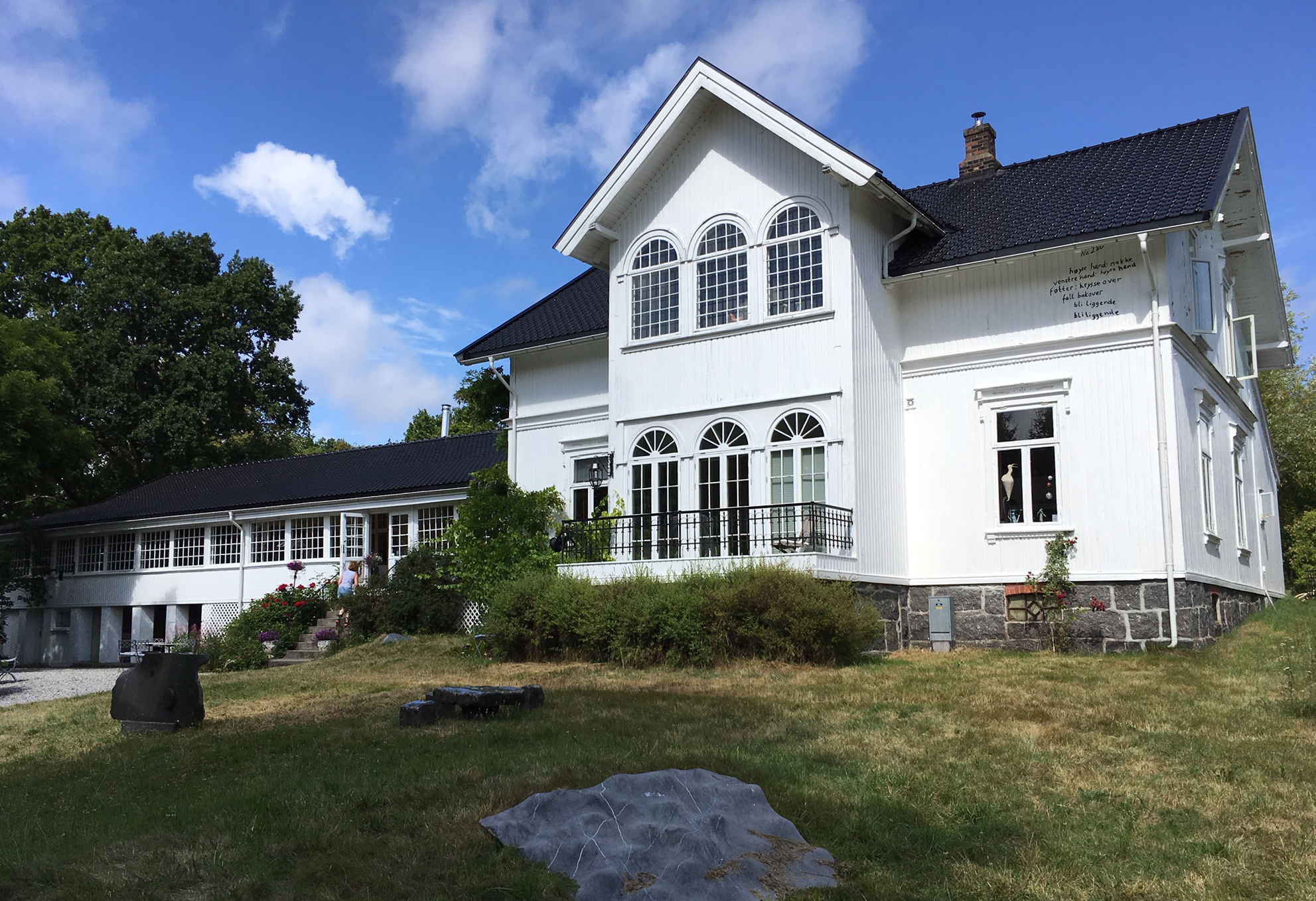 Hovedbygningen ved Gamle Ormelet 2017